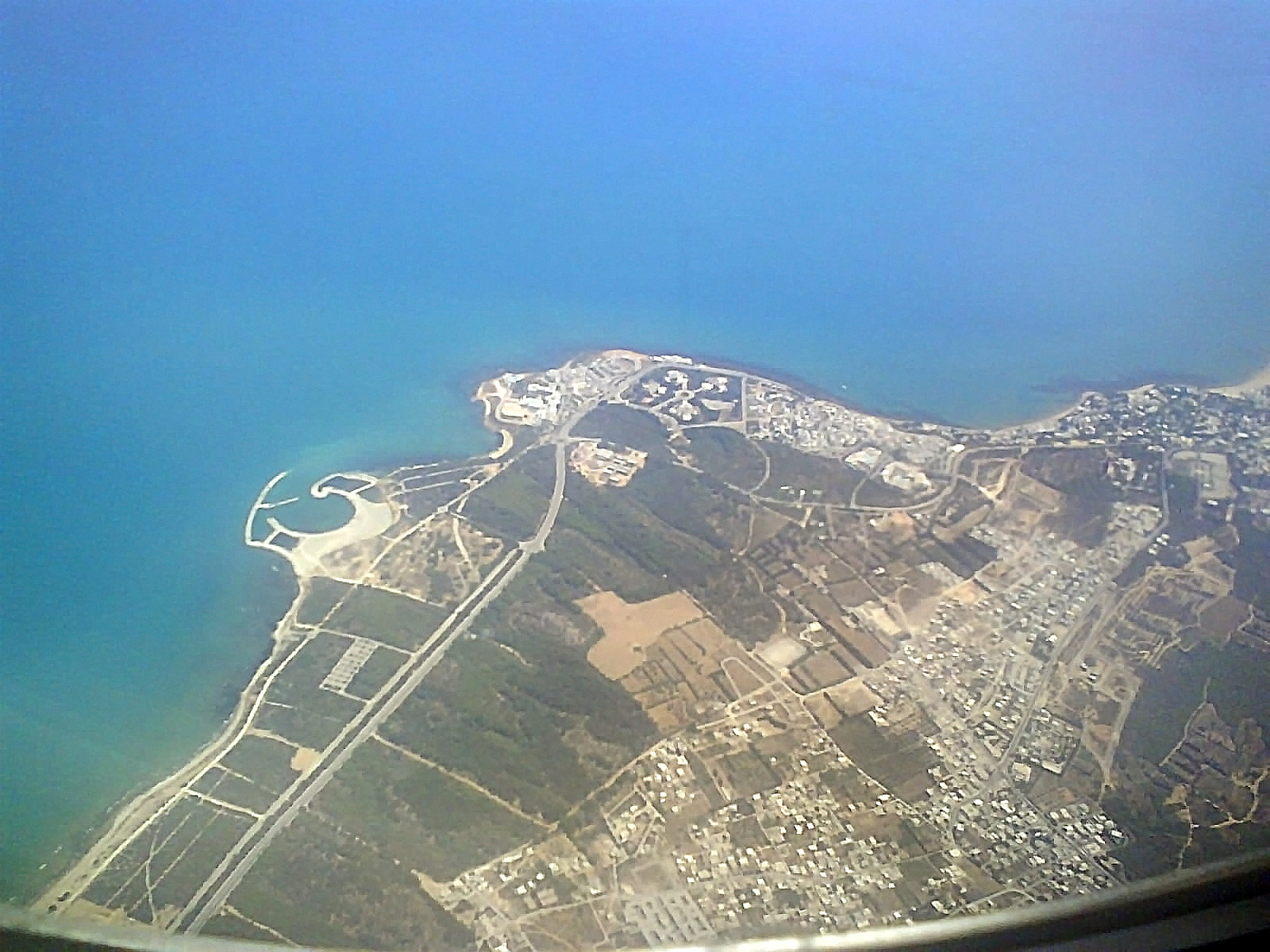 Vue aérienne de la ville de Gammarth. On voit la colline qui longe la cote. On voit sur la cote le port de plaisance en cours de construction.